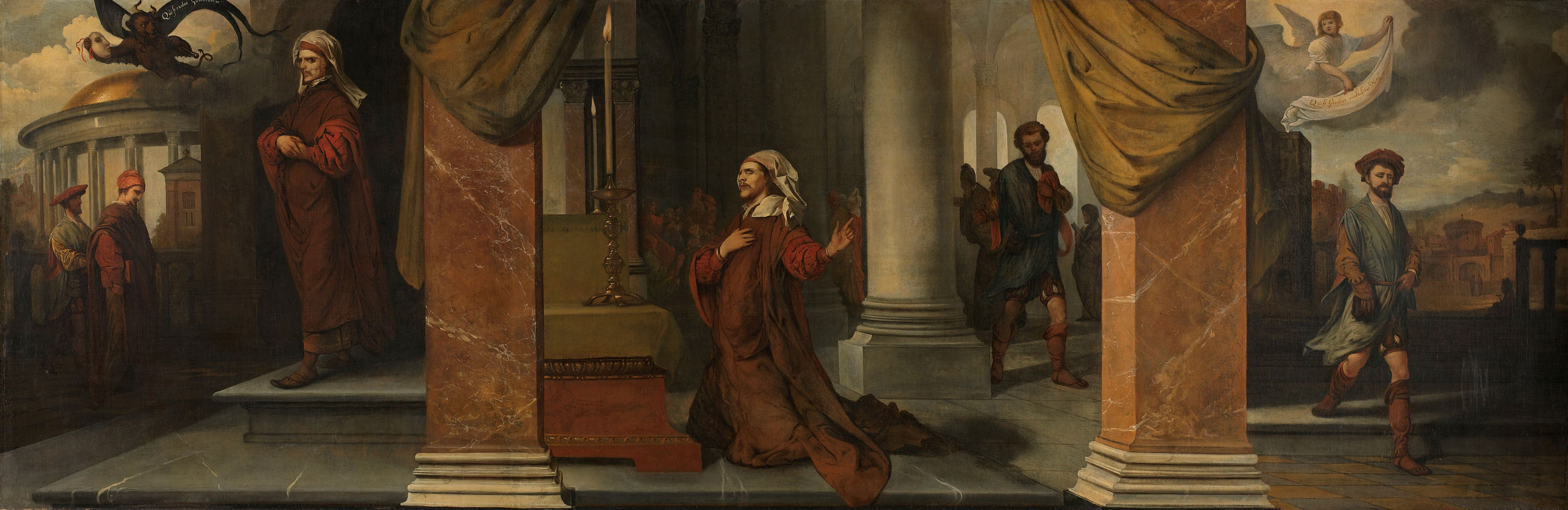 De parabel van de Farizeeër en de tollenaar, voorgesteld in drie taferelen. In het midden knielt de Farizeeër voor het altaar, links verlaat de hoogmoedige Farizeeër met een duivel de tempel, rechts verlaat de tollenaar de tempel met een engel. Het doek maakt deel uit van een reeks van parabels geschilderd voor de Lutherse kerk in Leiden (zie ook nrs. SK-A-2958 en SK-A-2960).